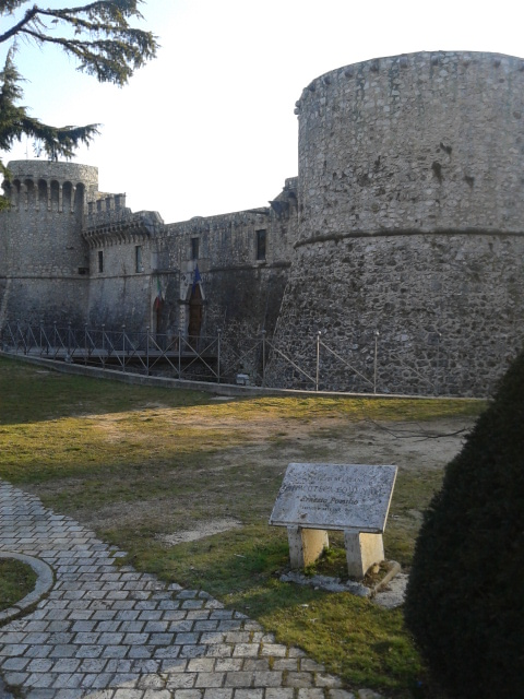 Castello Orsini-Colonna